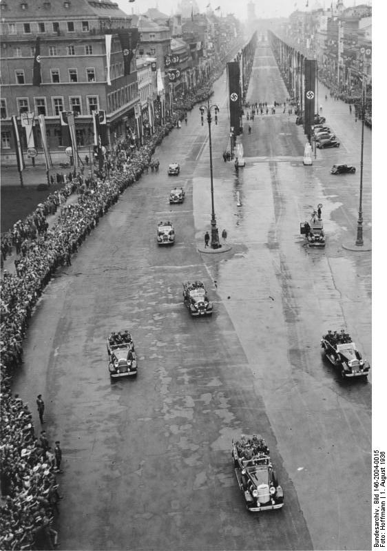 Am Eröffnungstage der Olympischen Spiele. Der Führer begibt sich zur Eröffnung. Unter dem Jubel der Hunderttausend passiert der Führerwagen den Pariser Platz. Im Hintergrund die festlich geschmückte Straße Unter den Linden. 1.8.36